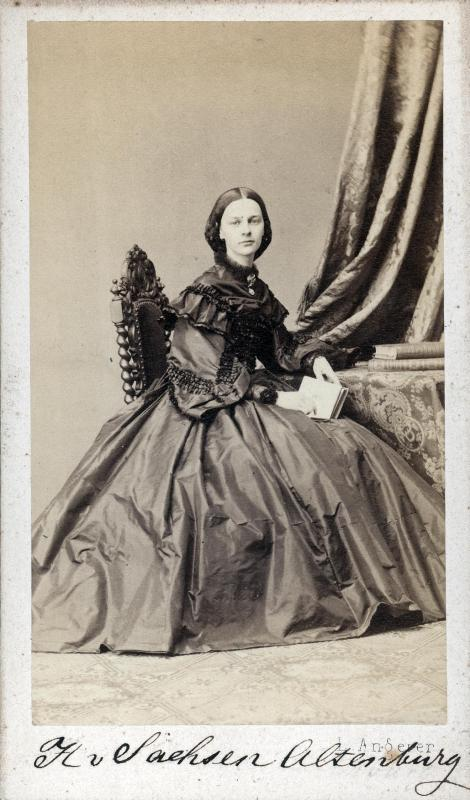 Bildnis in jüngeren Jahren